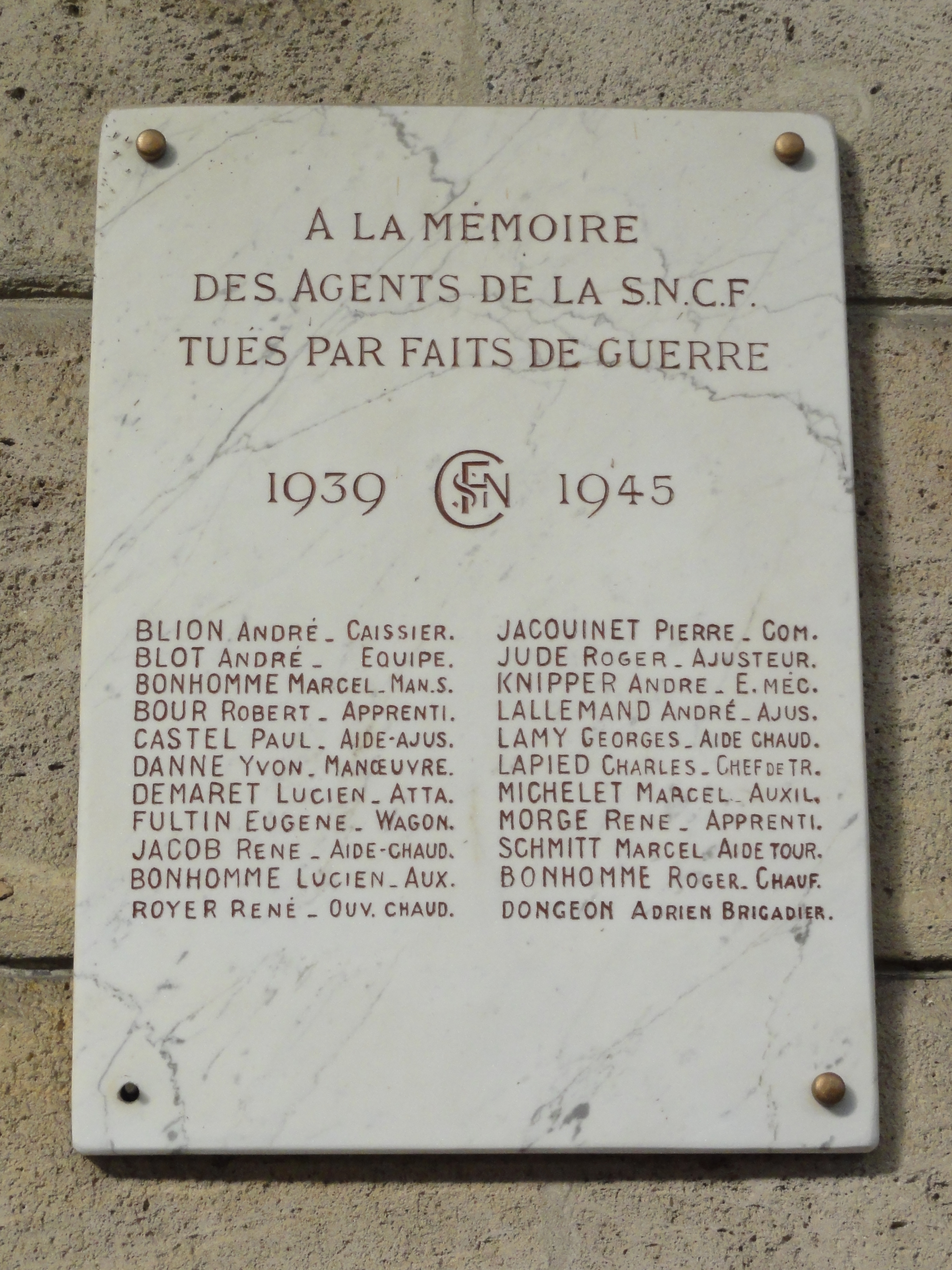 Bar-le-Duc (Meuse) gare, plaque guerre 1939-45